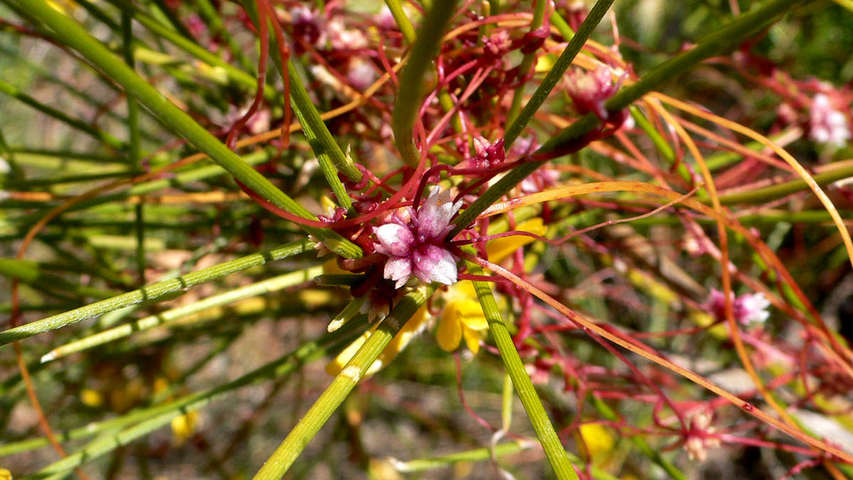 Cuscuta epithymum en Cabo Tiñoso. Parque Natural de la Sierra de la Muela en Cartagena (Spain).